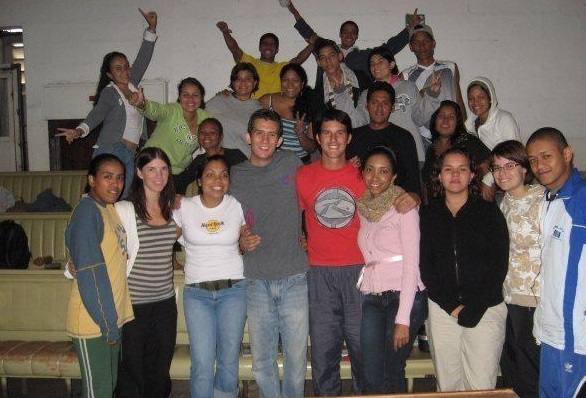 Curso EDE